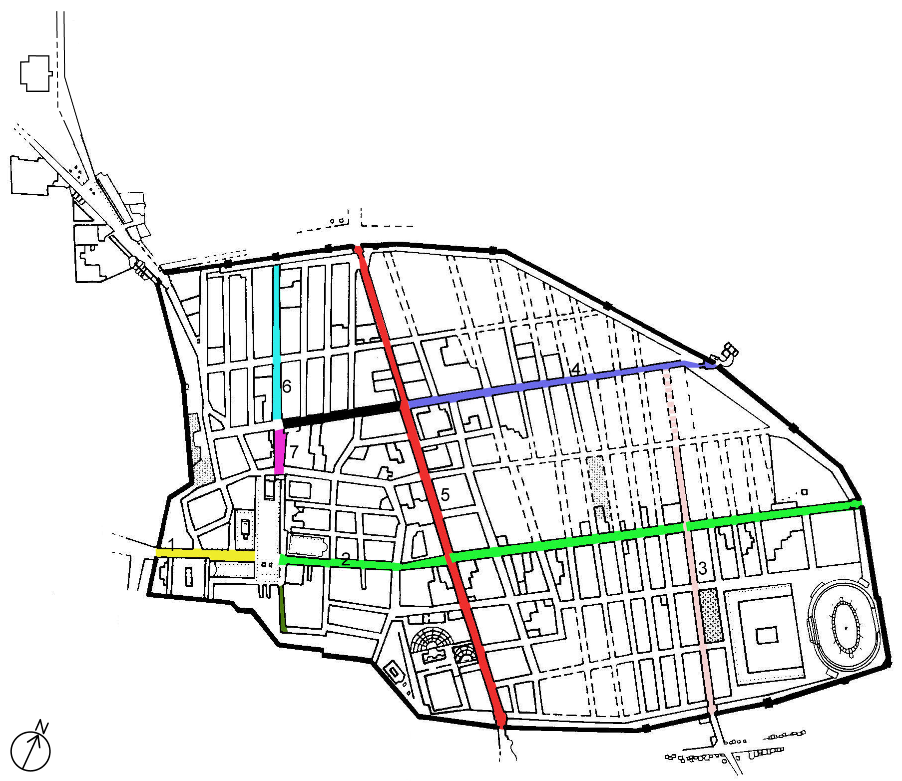 Hauptstraßennetz von Pompeji: 1. Via Marina (gelb); 2. Via dell'Abbondanza (grün); 3. Via di Porta Nocera (hell-rosa); 4. Via di Nola (dunkelblau); 5. Via di Stabia (rot); 6. Via di Mercurio (hellblau); 7. Via del Foro (pink)